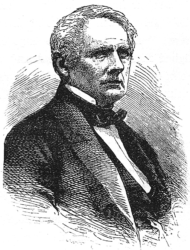 Christian Flor (1792-1875) var en dansk præst, politiker og højskolemand.